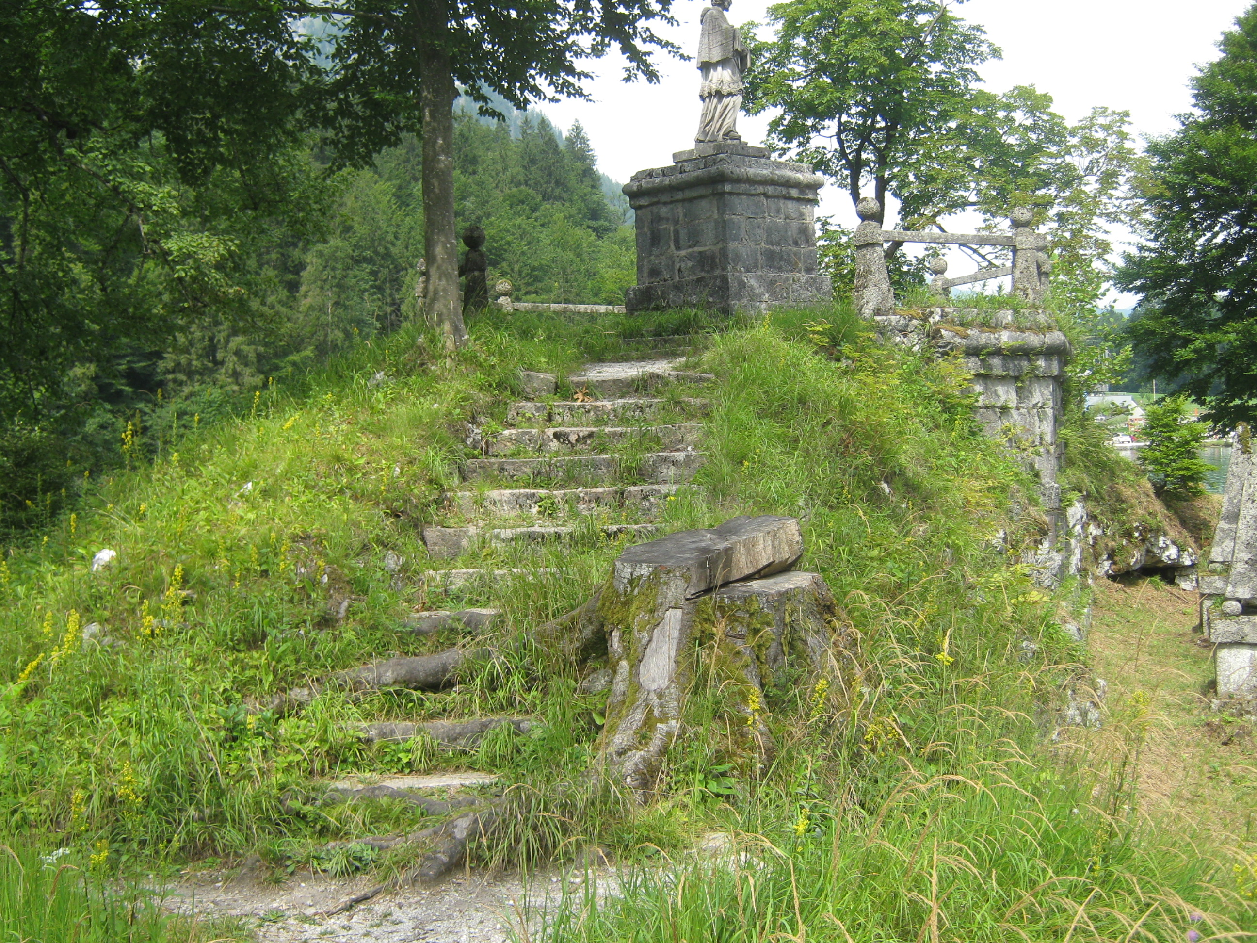 Insel Christlieger, Königssee, Oberbayern, südlicher Treppaufgang zur Plattform